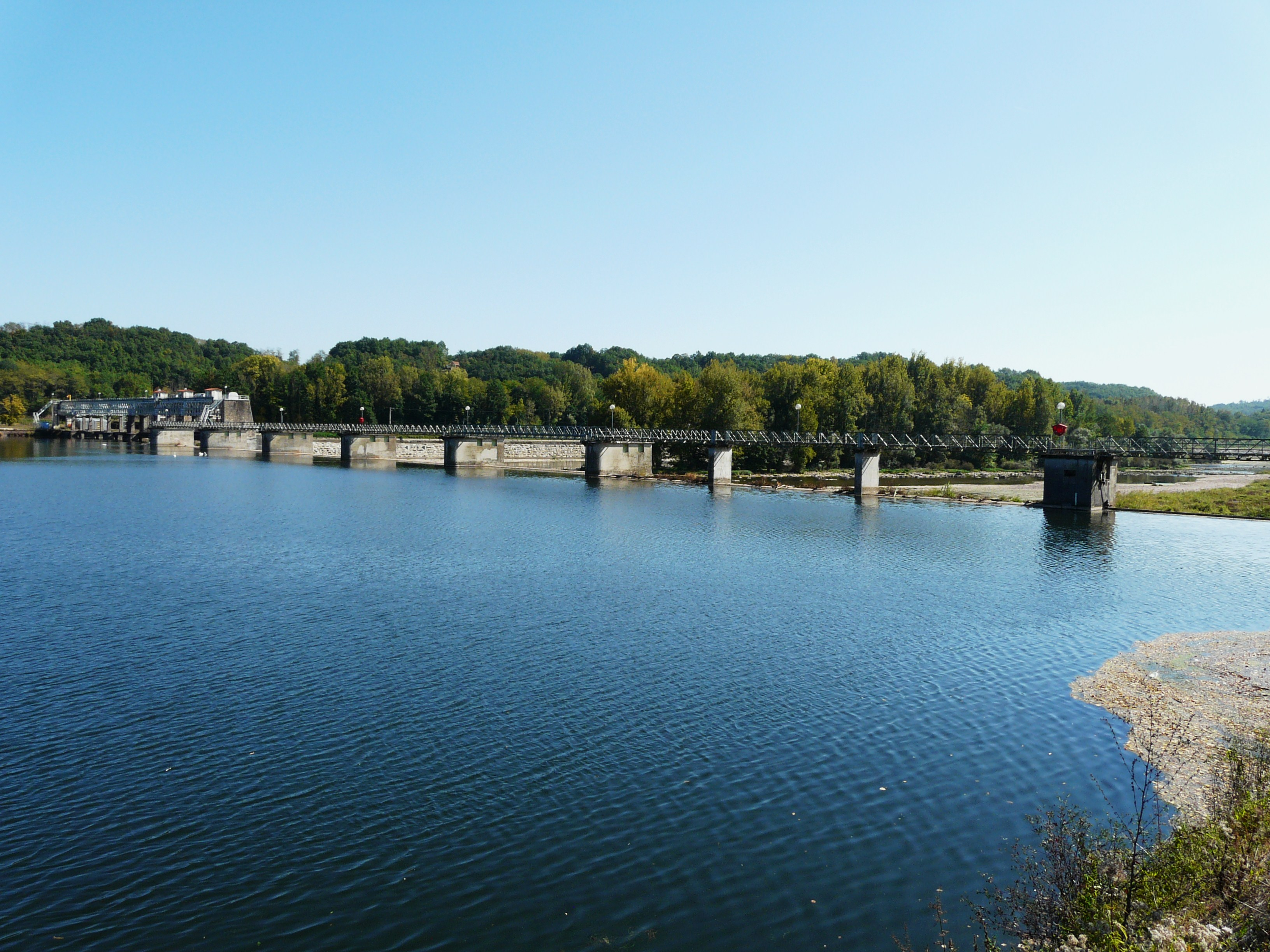 Le barrage de Mauzac sur la Dordogne entre Calès à gauche et Mauzac-et-Grand-Castang à droite, Dordogne, France.